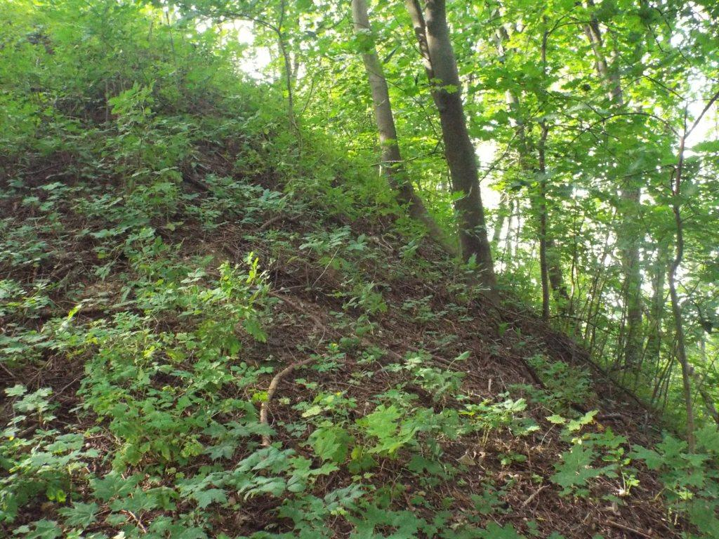 Bronisławka